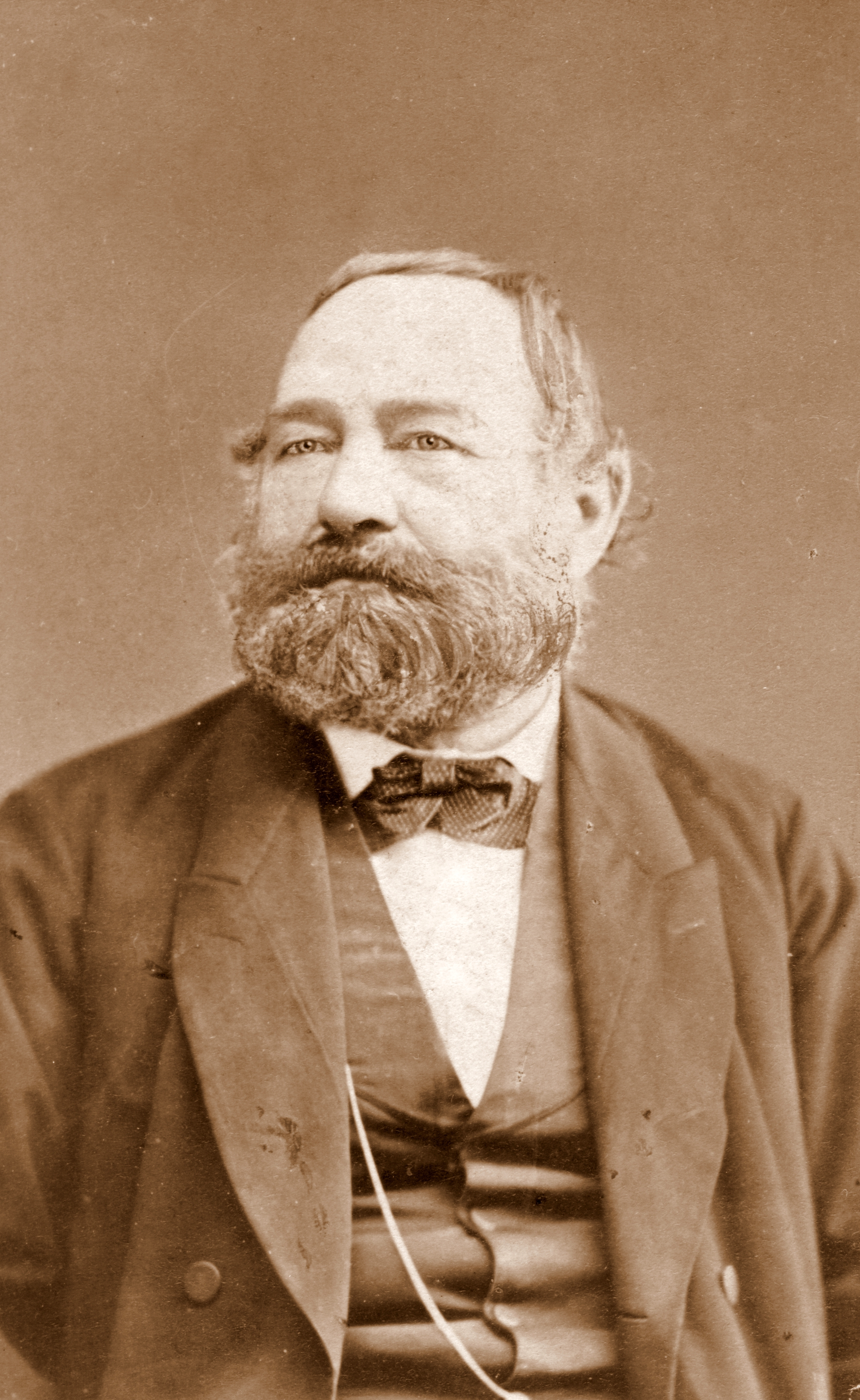 Der Eisenacher Architekt, Baumeister und Ziegelfabrikant Eduard Sältzer um 1875